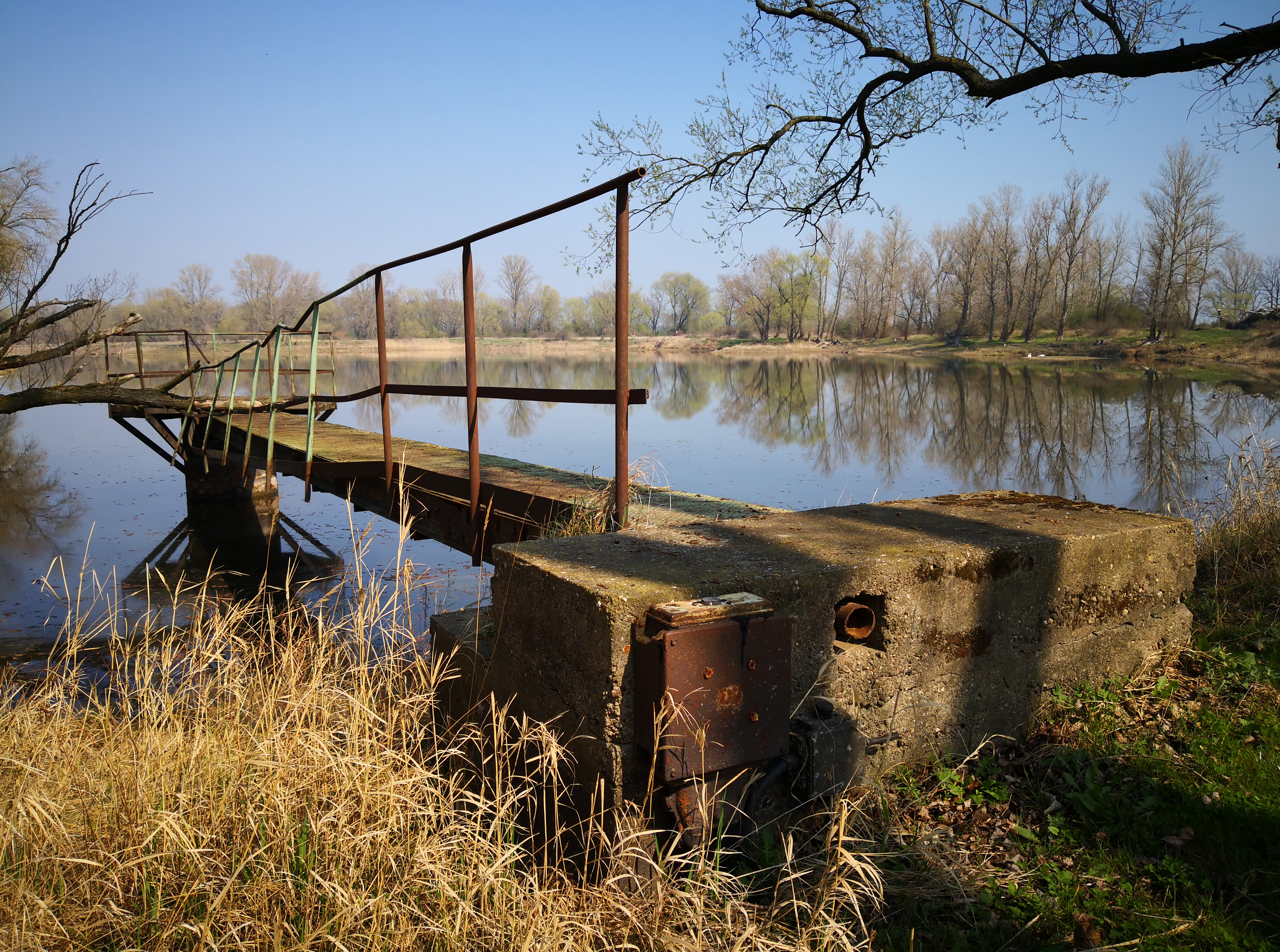 An der mittleren Elbe südöstlich von Magdeburg gibt es viel Stellen, an denen früher Kies abgebaut worden ist. Heute sind diese Restlöcher beliebte Ausflugsziele für Wanderer und Radfahrer; auch Angler sind hier oft zu sehen.